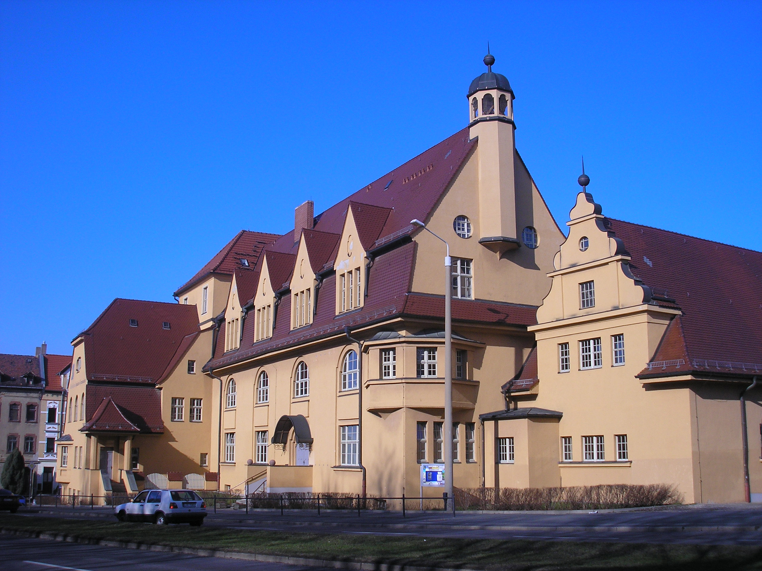 Das Spalatin-Gymnasium in Altenburg (Thüringen).